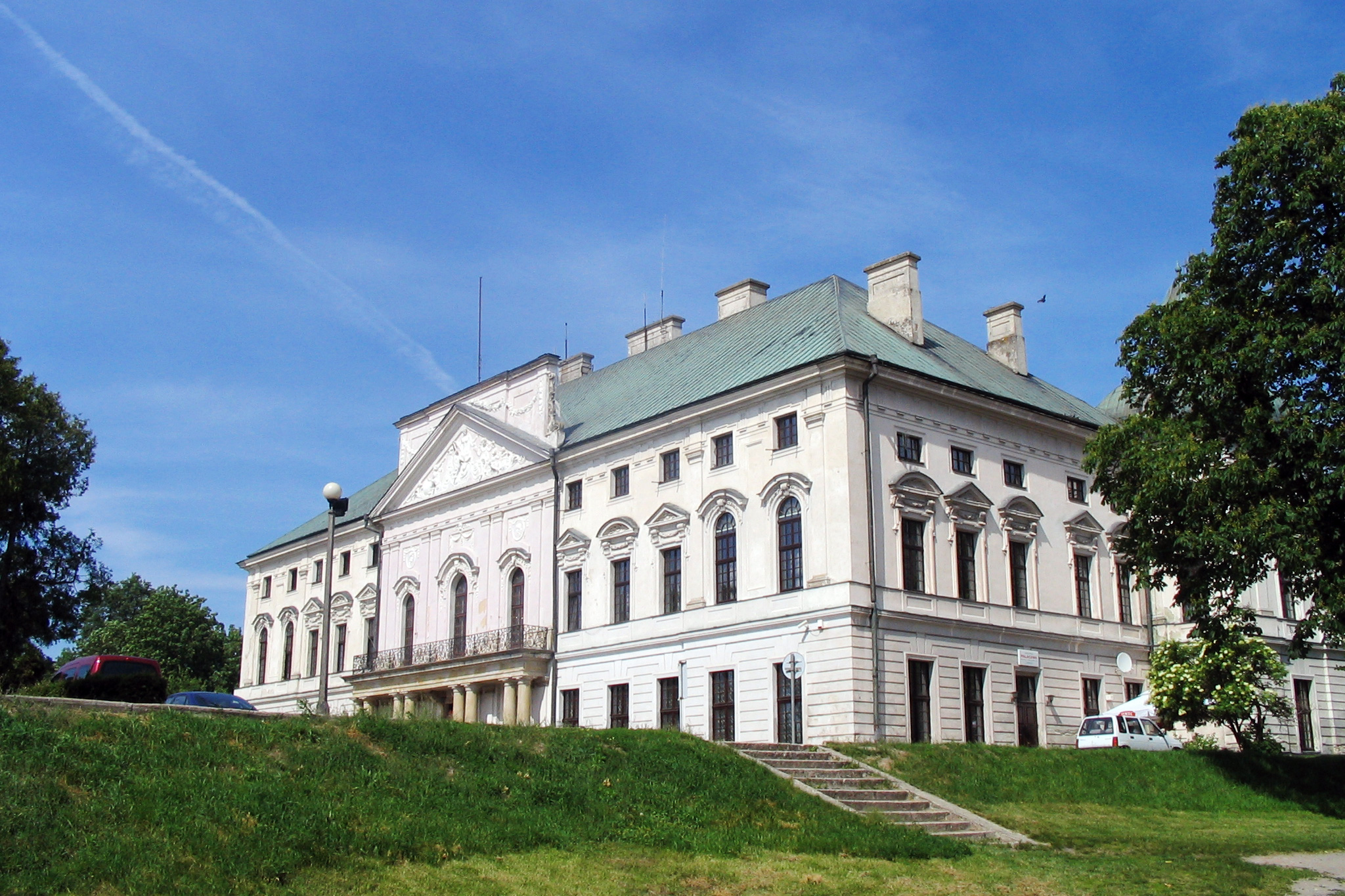 Pałac Sanguszków w Lubartowie. Zdjęcie wykonane w 2005 roku.